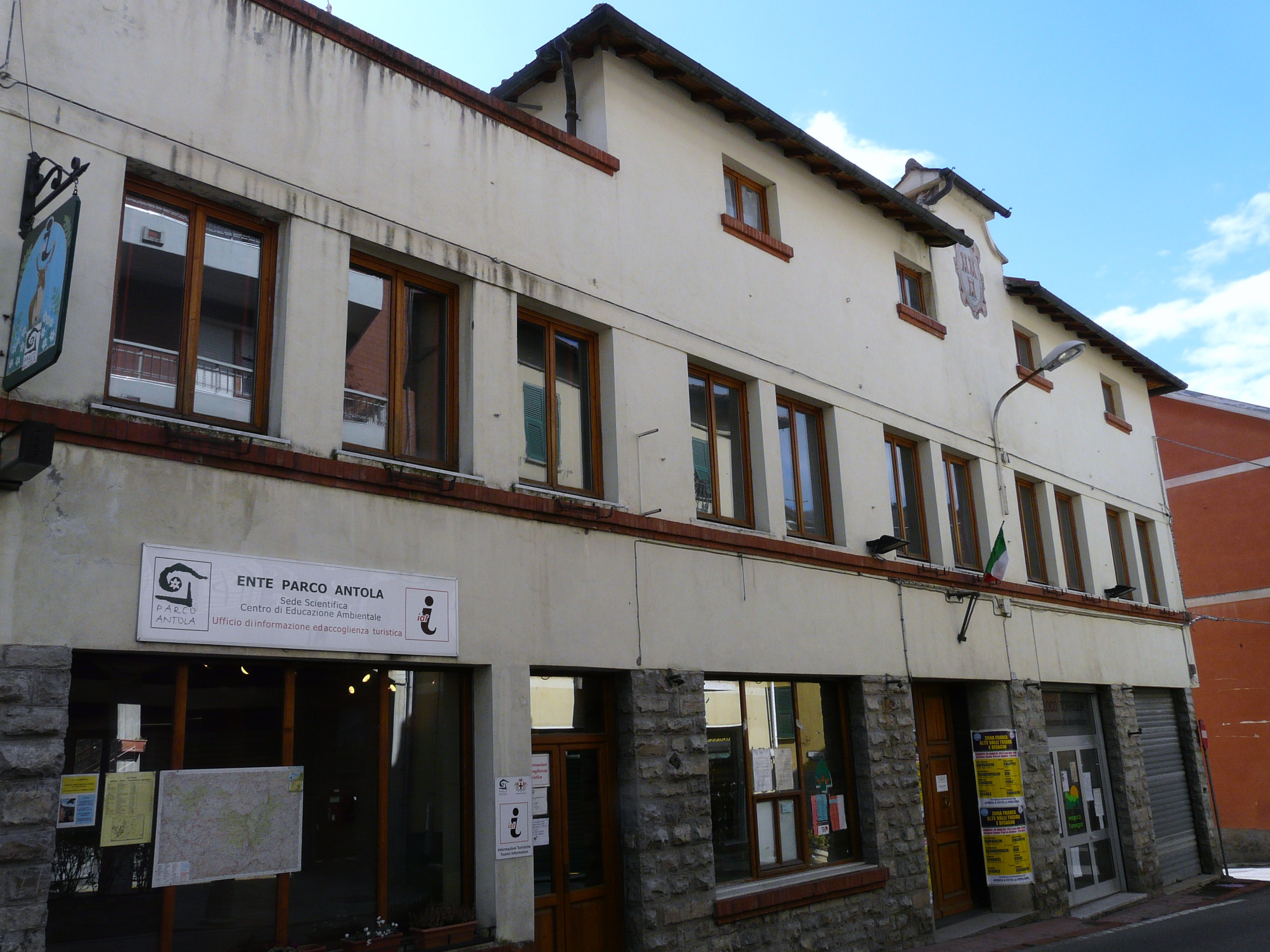 Sede dell'Ente Parco dell'Antola, Torriglia, Liguria, Italia